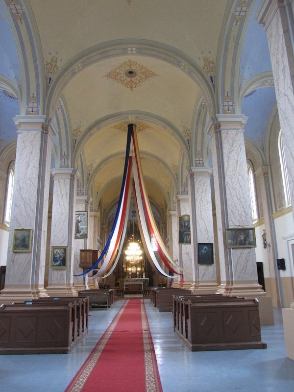 Нача. Касцёл Унебаўзяцця Найсвяцейшай Дзевы Марыі